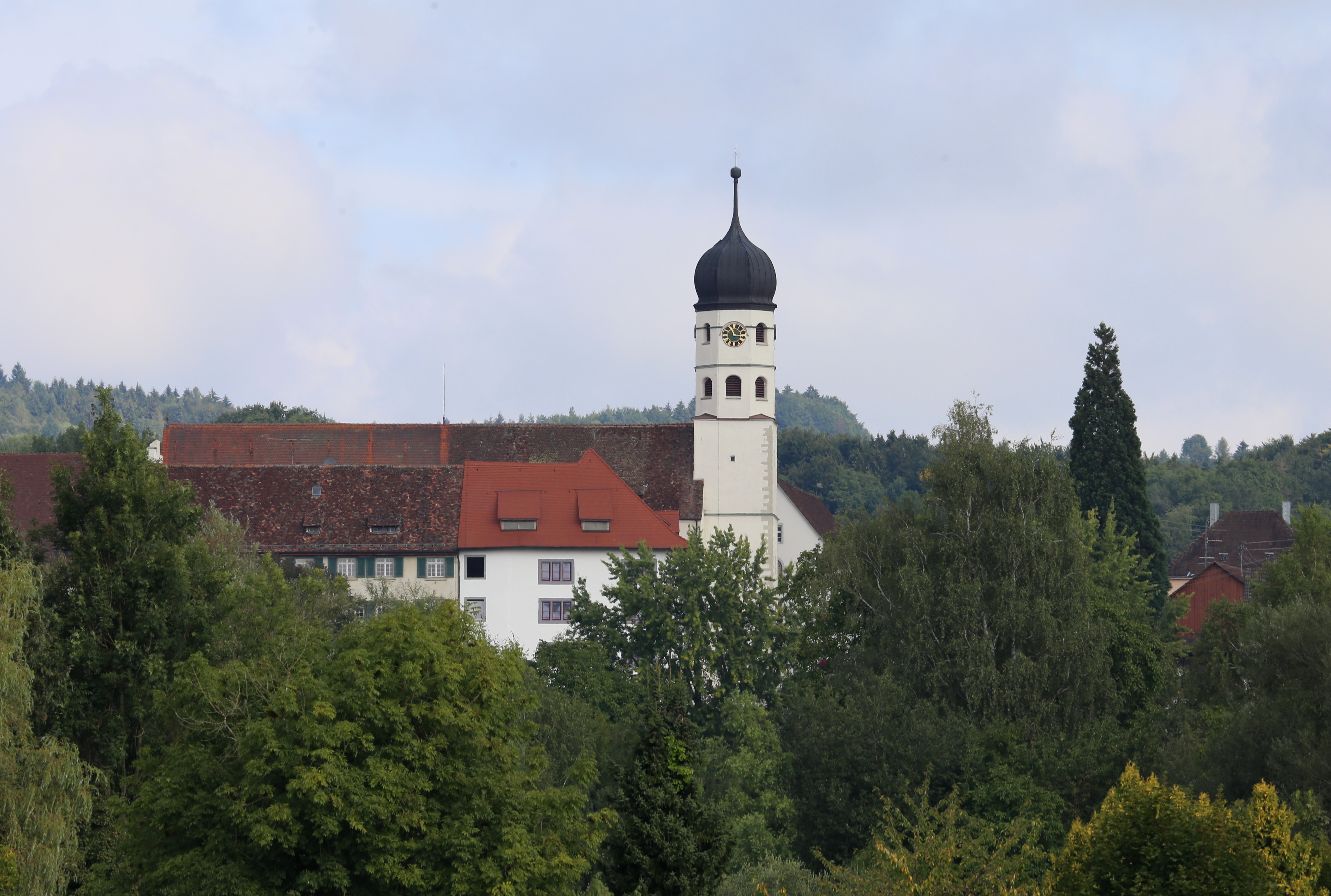 Katholische Pfarrkirche St. Hippolyt und Verena - Ehem. Augustiner-Chorherren-Stiftskirche